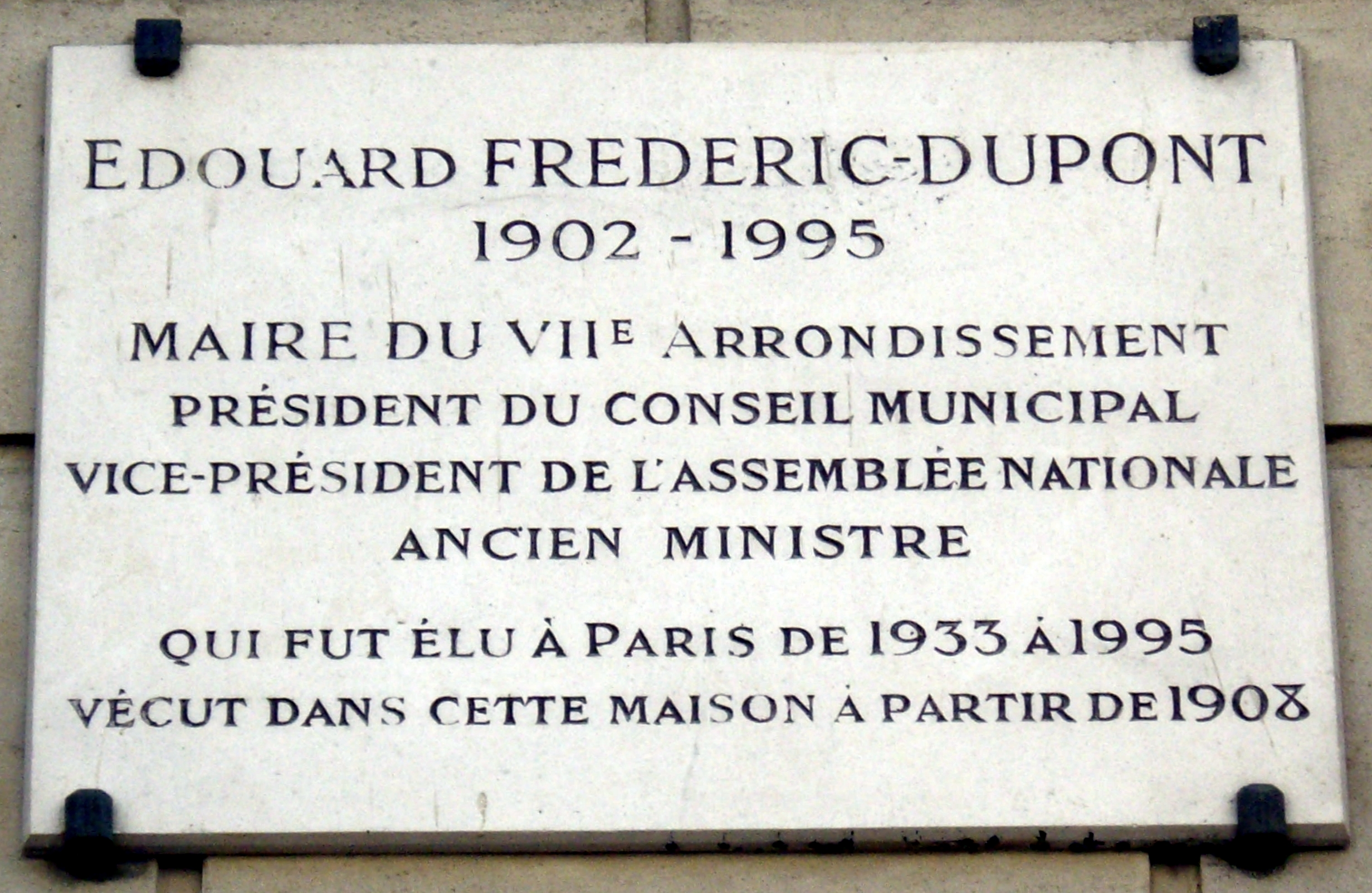 Plaque apposée au n° 177 du boulevard Saint-Germain, Paris 7e, où vécut l'homme politique Édouard Frédéric-Dupont (1902-1995) à partir de 1908.